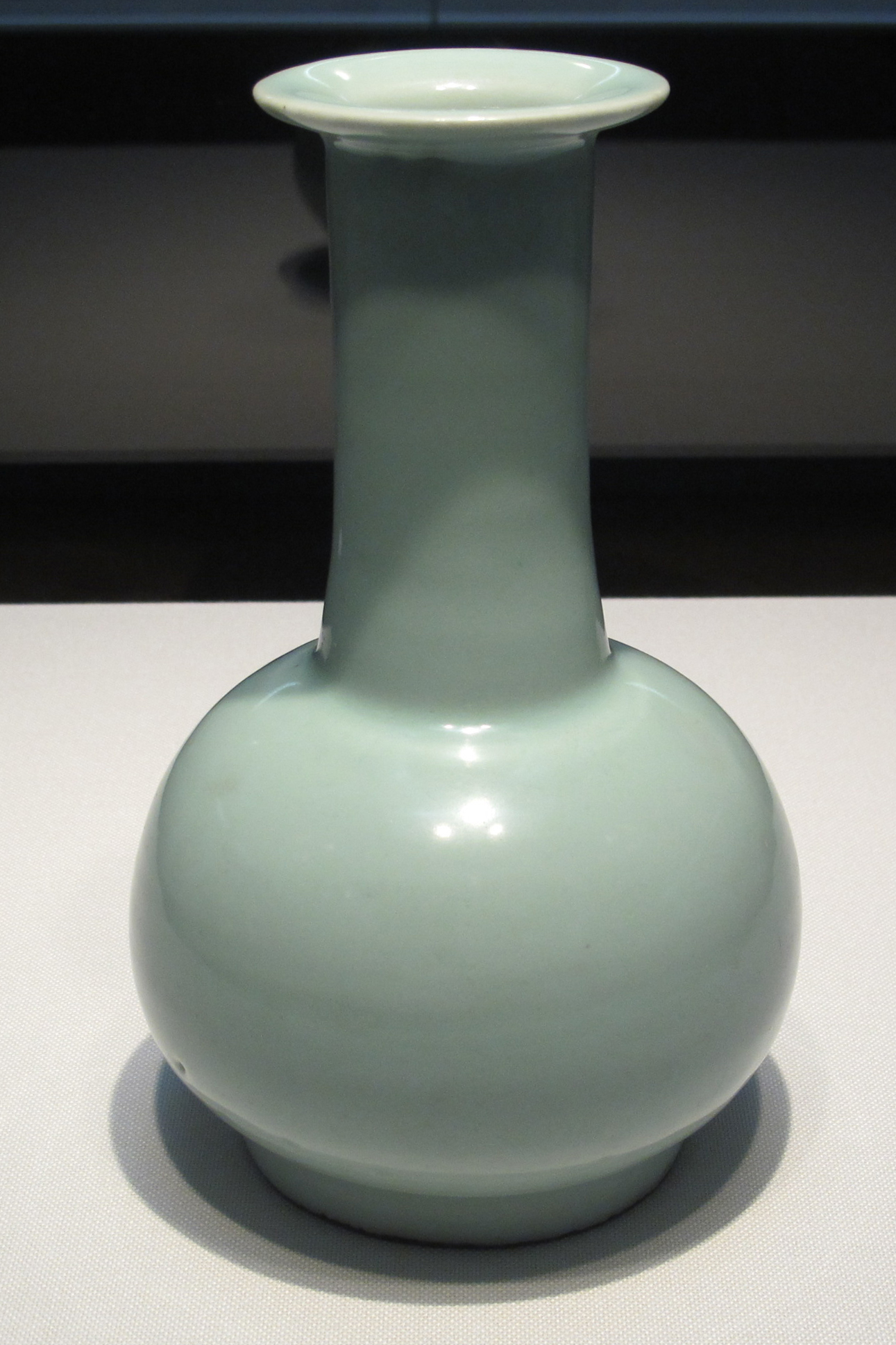 Dinastia song del sud, vaso con collo lungo, XIII sec